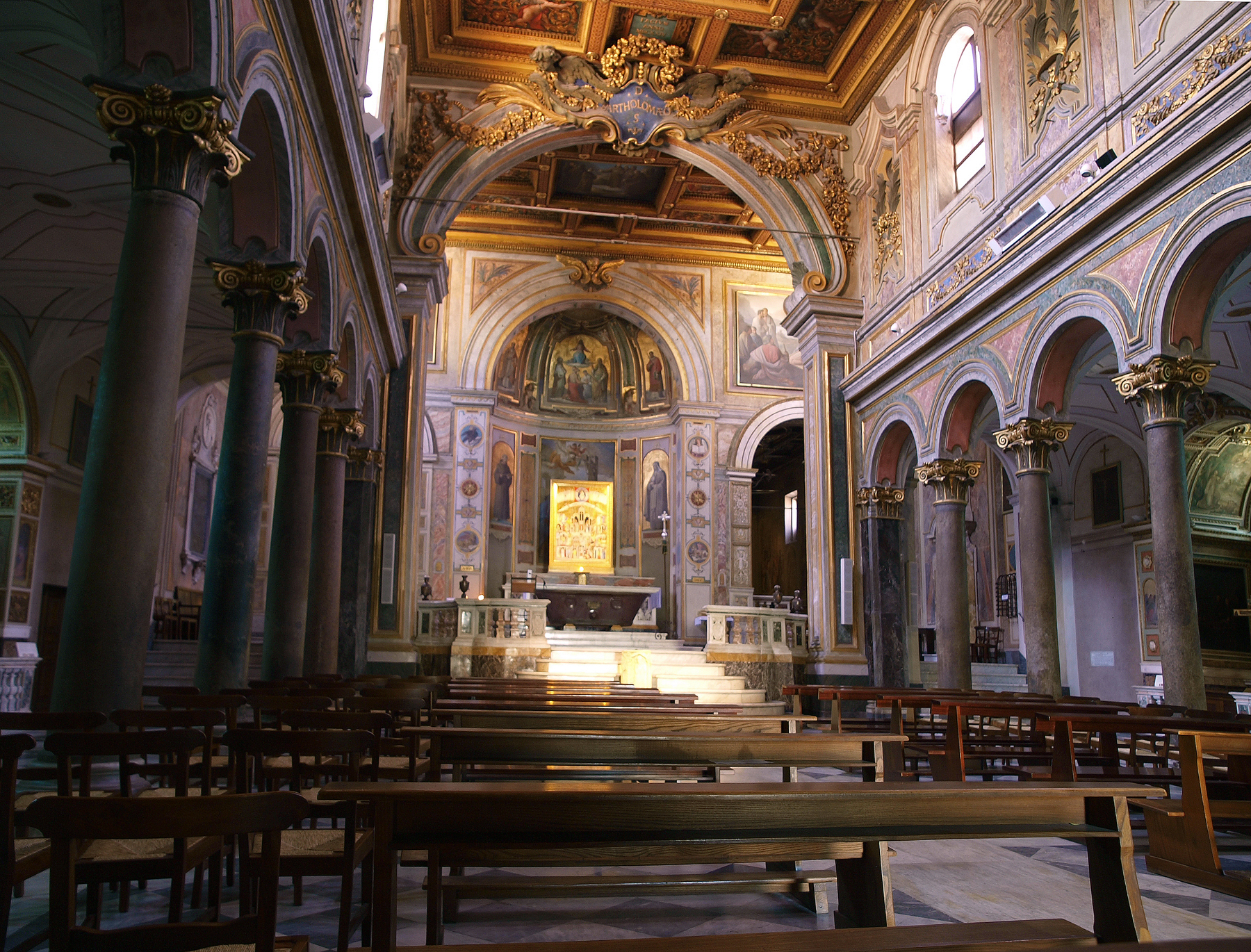 Chiesa San Bartolomeo sull'Isola Tiberina, a Roma. Interno.